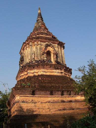 Chiang Mai